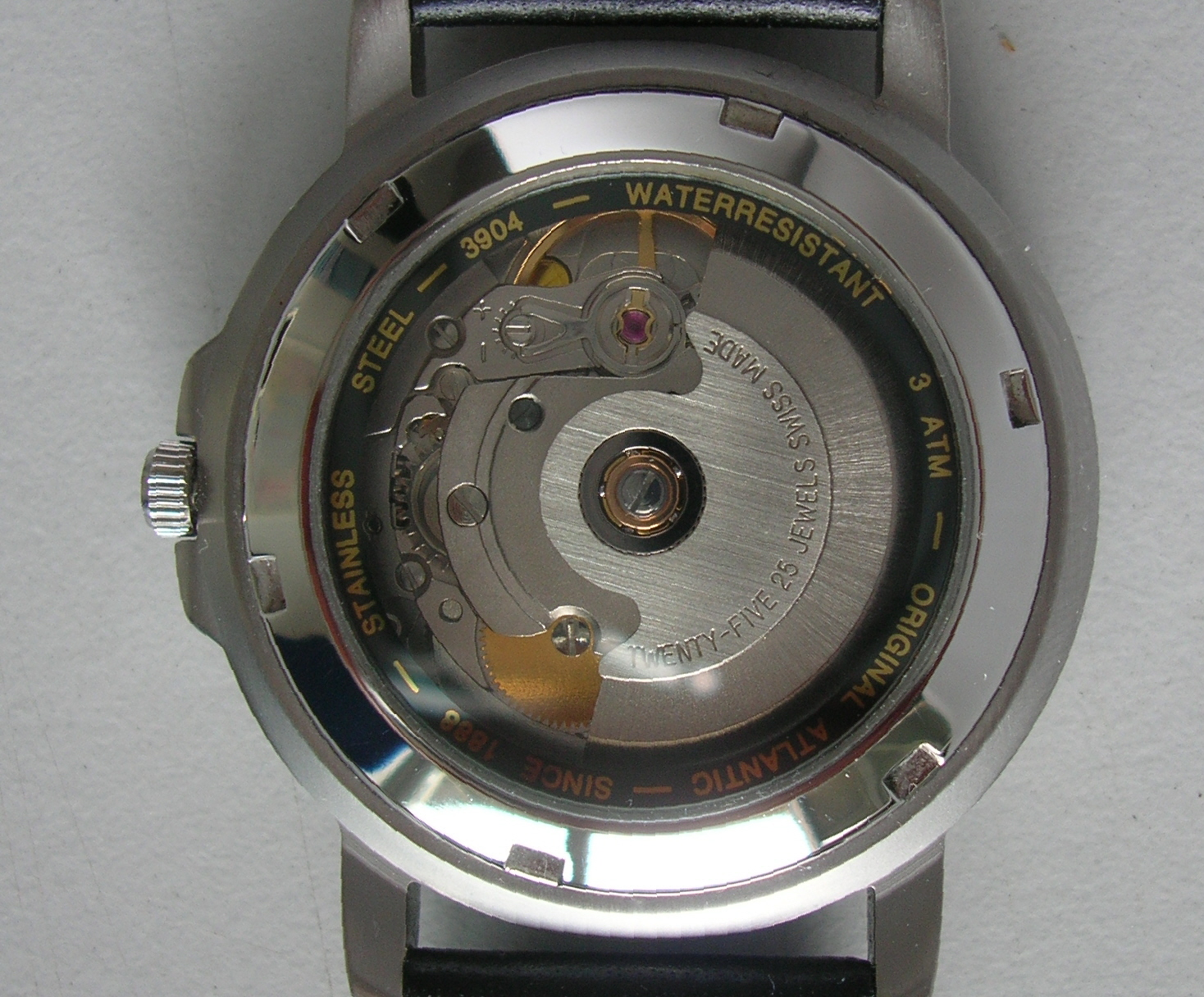 Rückseite einer Atlatic Worldmaster mit ETA 2824-2 Kaliber